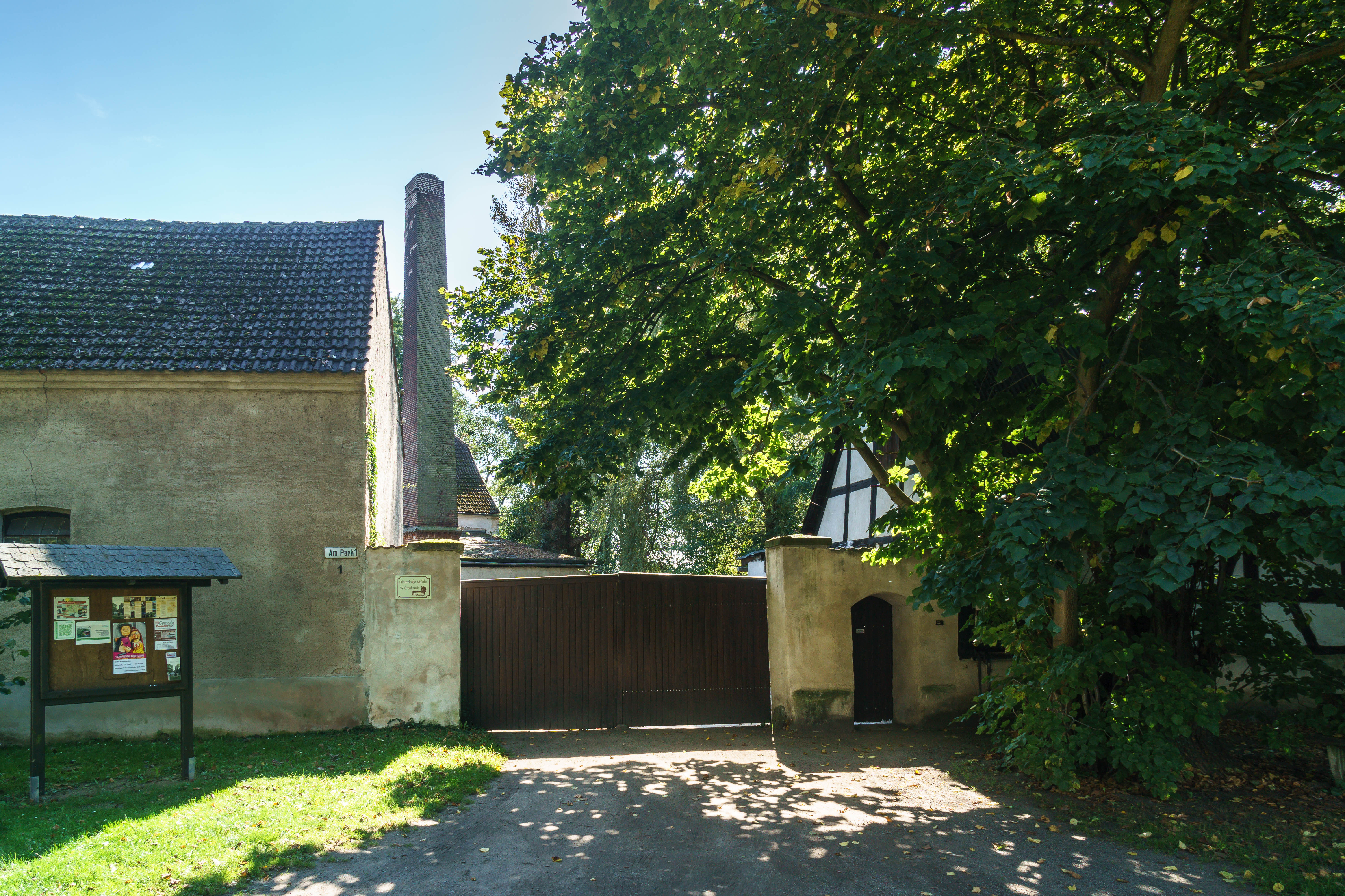 Elstermühle, Wassermühle Am Park 1 in Uebigau-Wahrenbrück OT Wahrenbrück